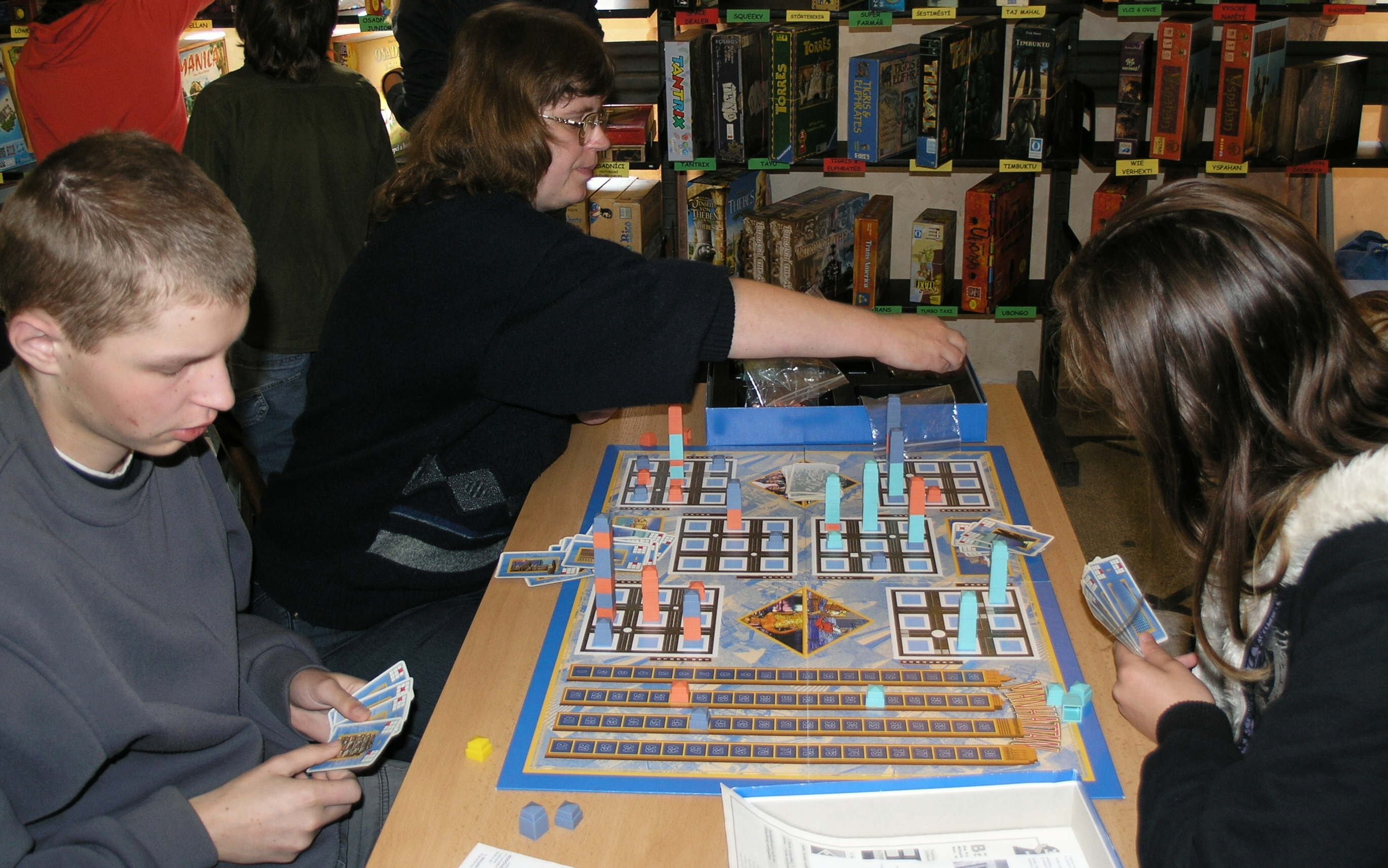 Deskohraní 2008